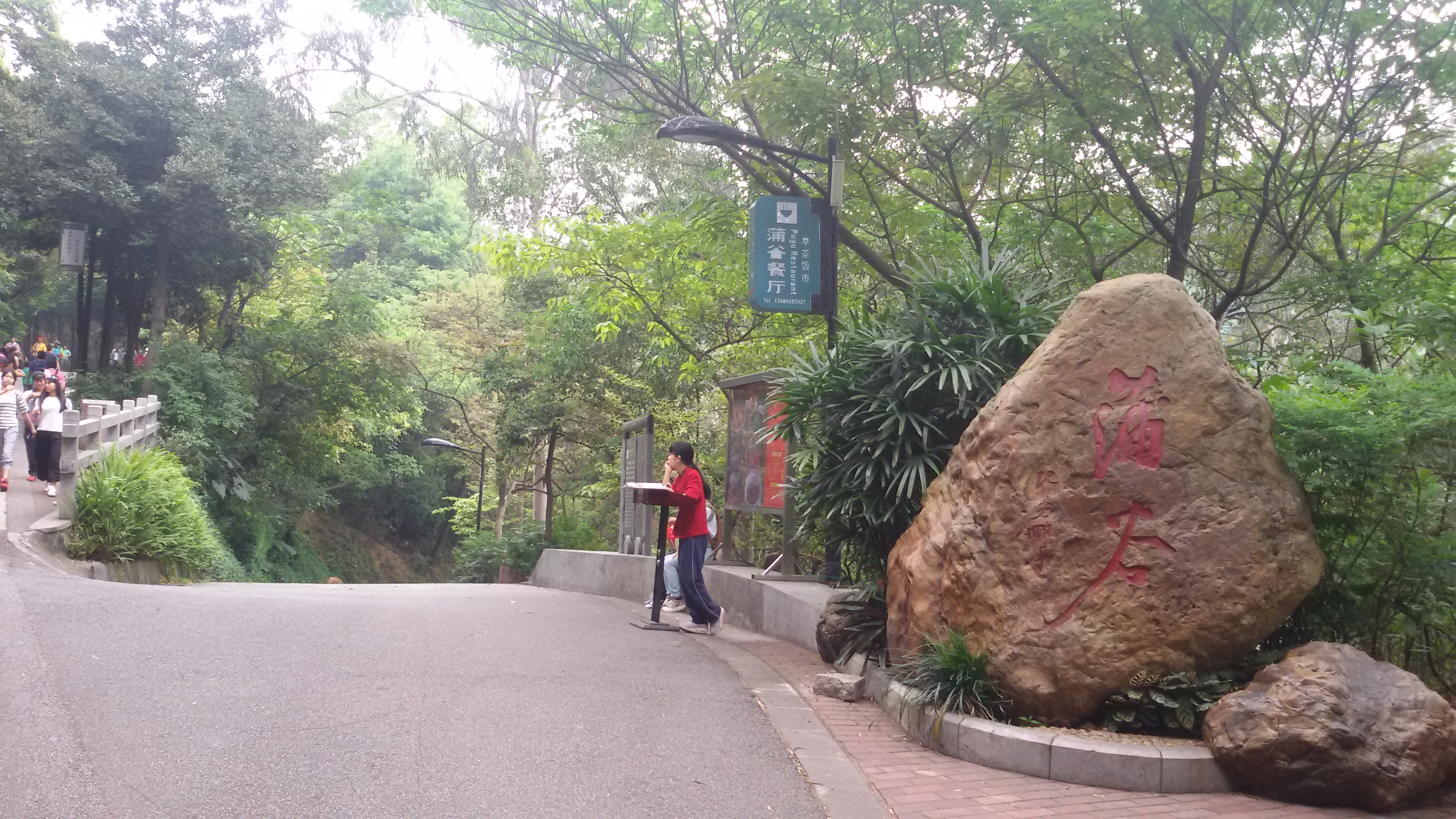 粵語: 蒲谷嘅正式出入口